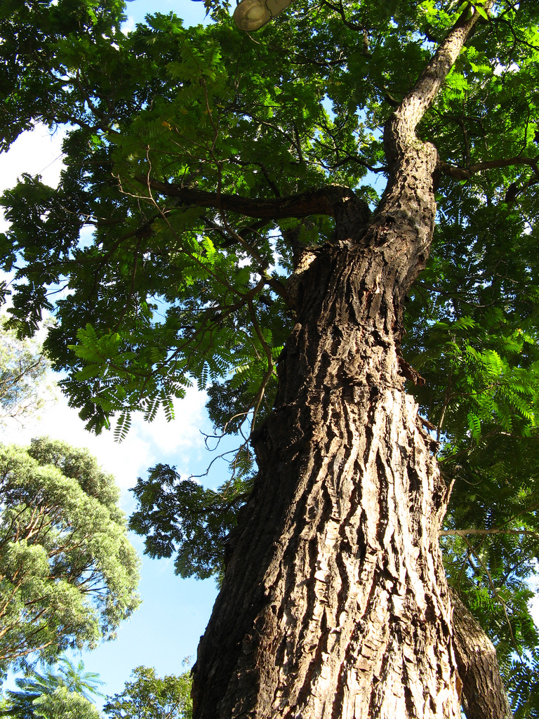 cedrella fissilis aclimação sao paulo